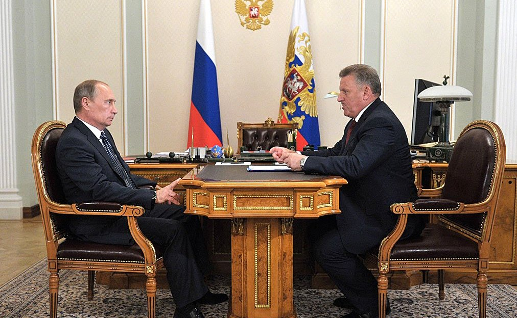 Рабочая встреча Президента России Владимира Путина с временно исполняющим обязанности губернатора Хабаровского края Вячеславом Шпортом